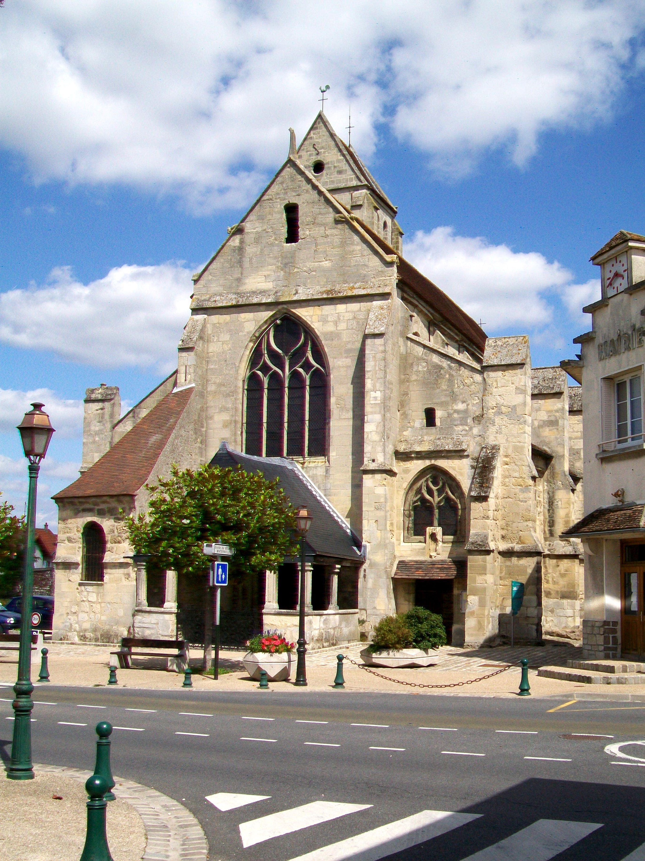 L'église Saint-Étienne depuis le sud-ouest.